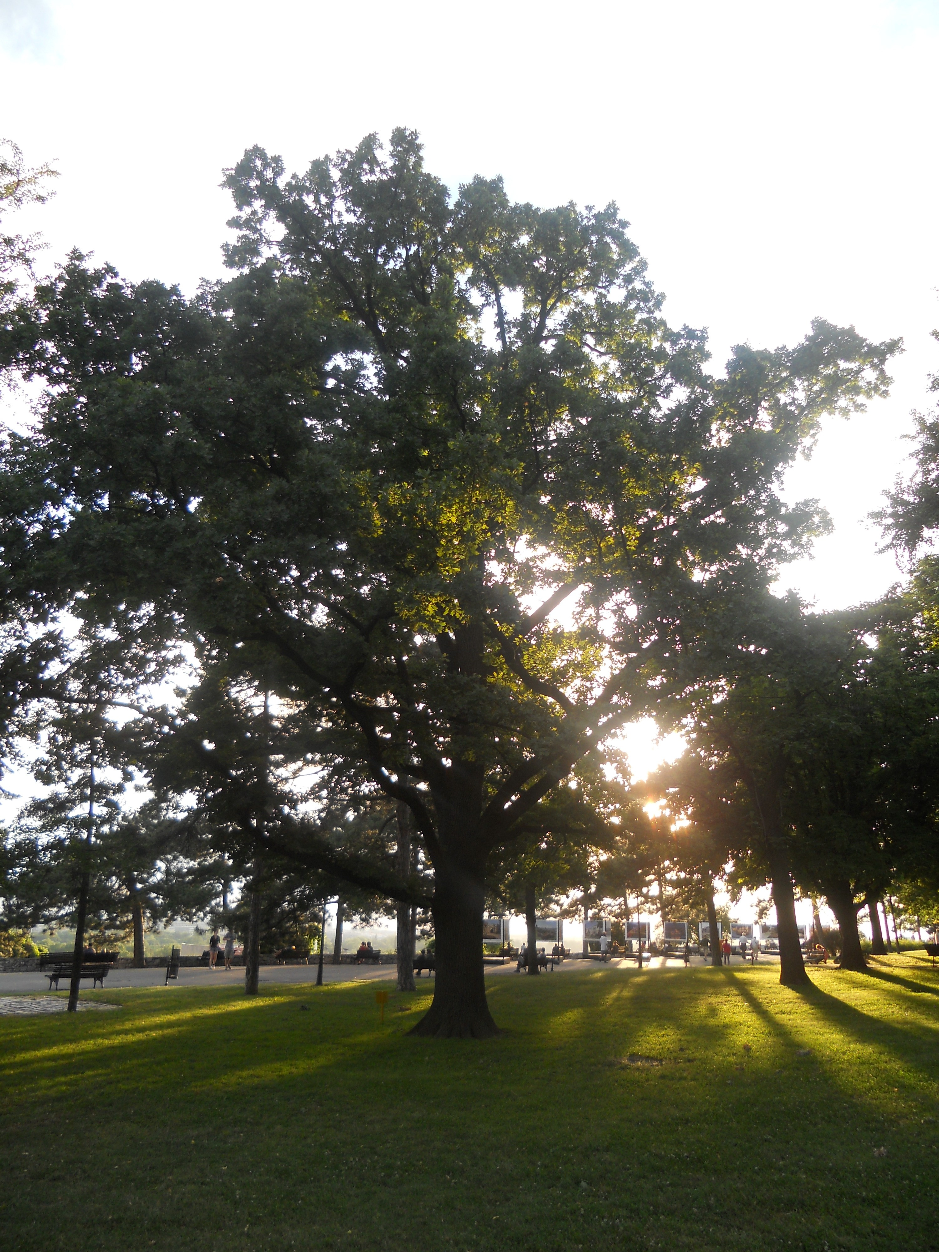 Srpski (latinica): Hrast lužnjak Kalemegdan Ово је фотографија заштићеног природног добра у Србији под шифром: СП008 This is a a photo of a natural area in Serbia with ID: СП008